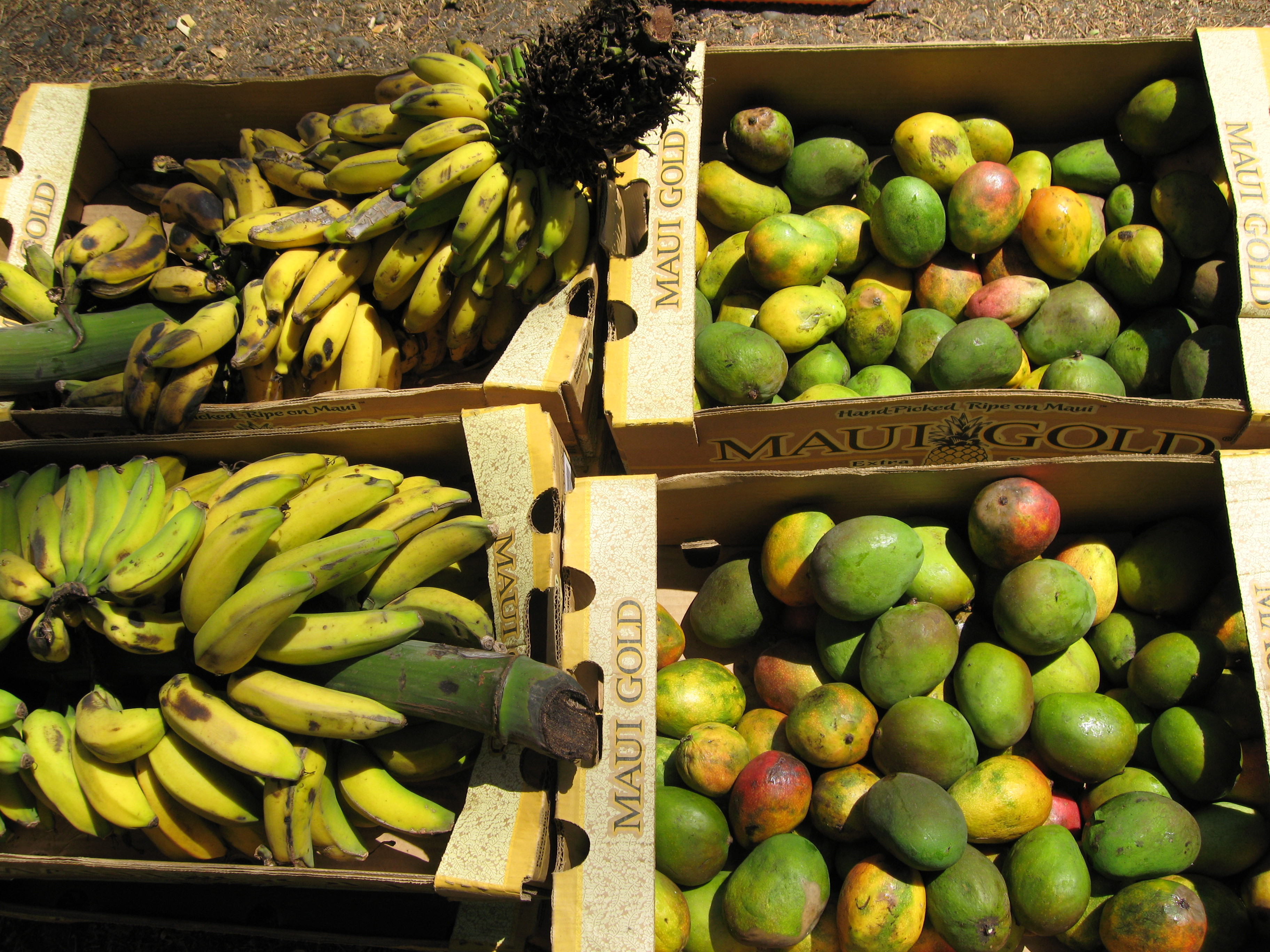 Mangoes and bananas in boxes.